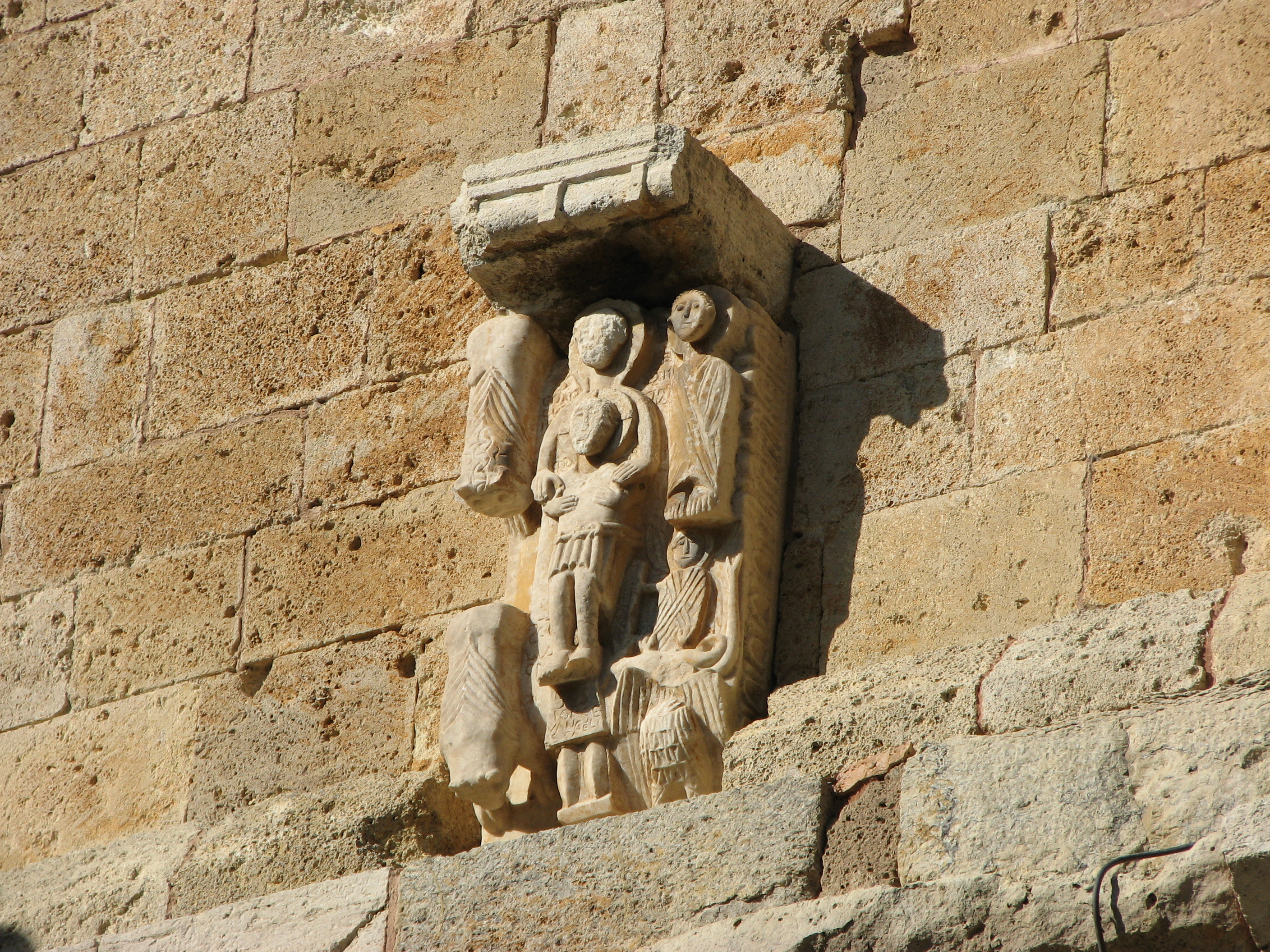 L'Abbazia di Sant'Antimo (Montalcino, Toscana, Italy) - Bassorilievo sulla parete esterna del campanile